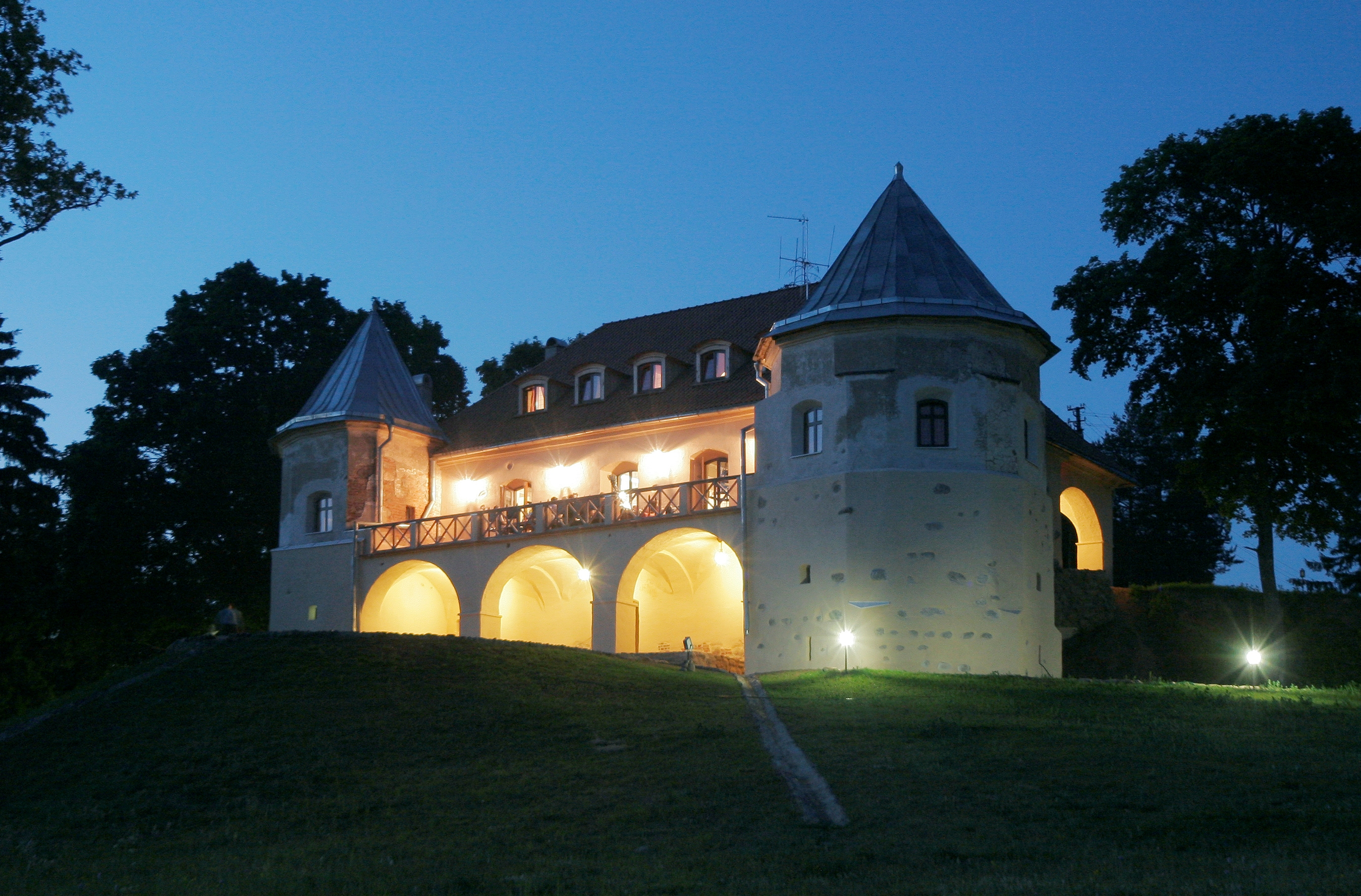 Norviliškės Castle, Lithuania